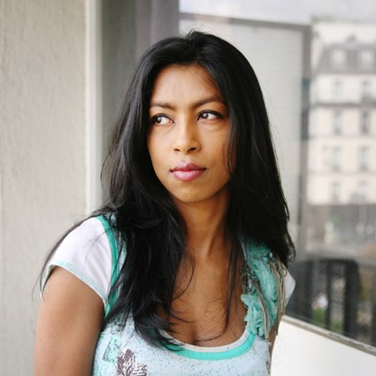 Shumona SINHA in Paris